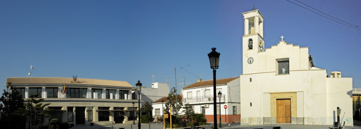 Centro social e iglesia